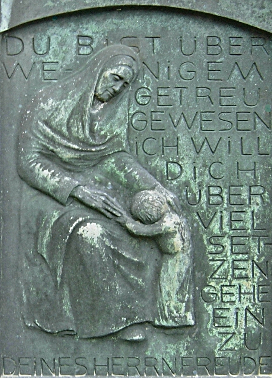 Ingeborg von Rath (* 4. Juni 1902, † 2. Juli 1984): Bronzeplakette für Katharina Winkelmann (1848–1933) an der Begräbnisstätte Furmans auf dem Poppelsdorfer Friedhof in Bonn. Die Bildhauerin (eine Verwandte der Furmans) liegt ebenfalls dort begraben. Von Rath studierte an der Kölner Kunstgewerbeschule (ab 1926 Kölner Werkschulen). Sie ließ sich 1927 in Bonn nieder (wo August Sander sie 1929 fotografierte). 1944 wurde sie Lehrbeauftrage für Kunsterziehung an der Universität Bonn (Vera Lwowski war eine ihrer Schülerinnen). Von Rath schuf u. a. Portraitbüsten von Konrad Adenauer sowie dem Erfinder und Fabrikanten Max Bicheroux (1876–1932). In Bonn wurde sie bekannt durch die Nachbildung (1958) der im Krieg eingeschmolzenen Figuren des Martinsbrunnens.